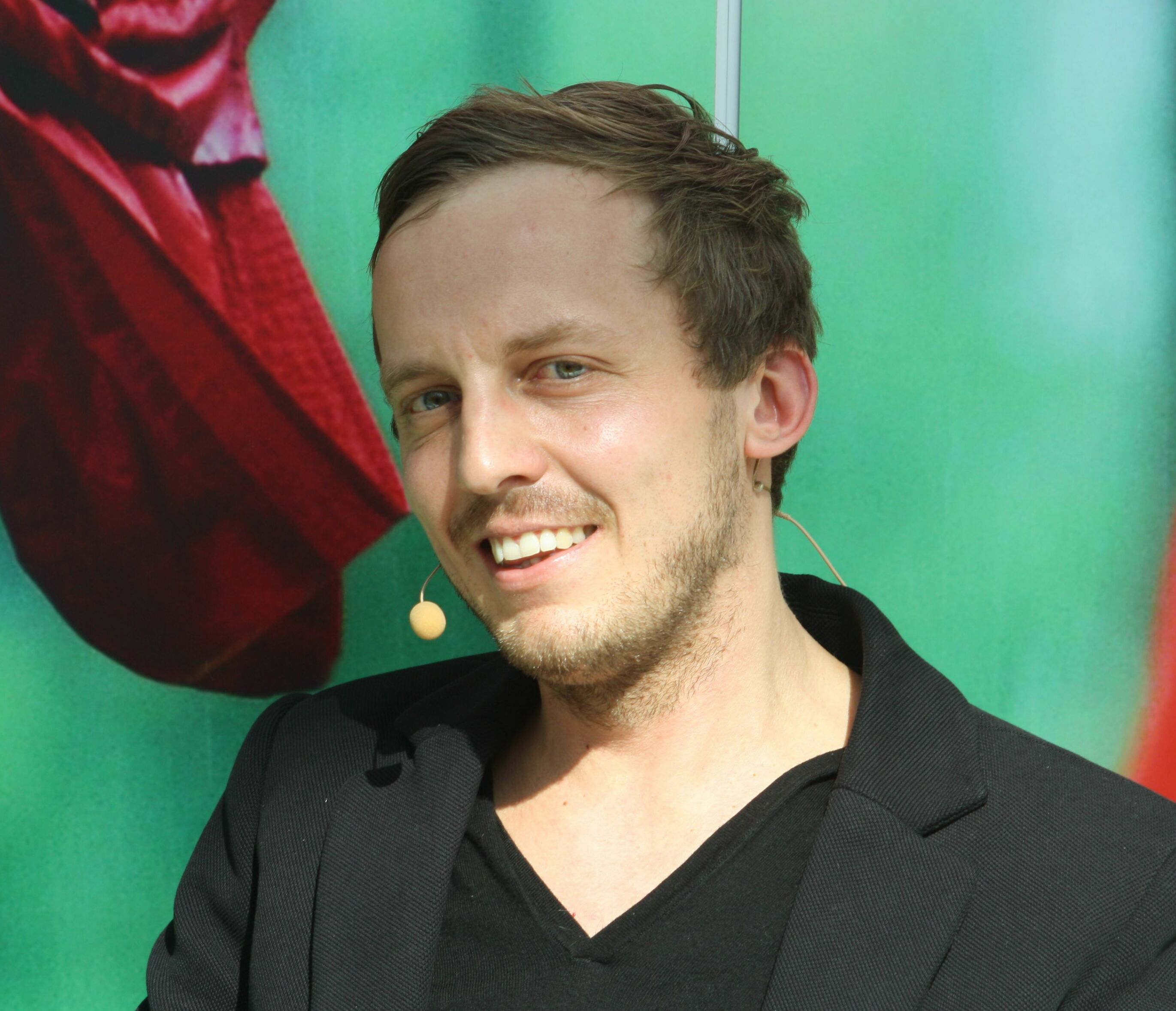 Slowakischer Schriftsteller